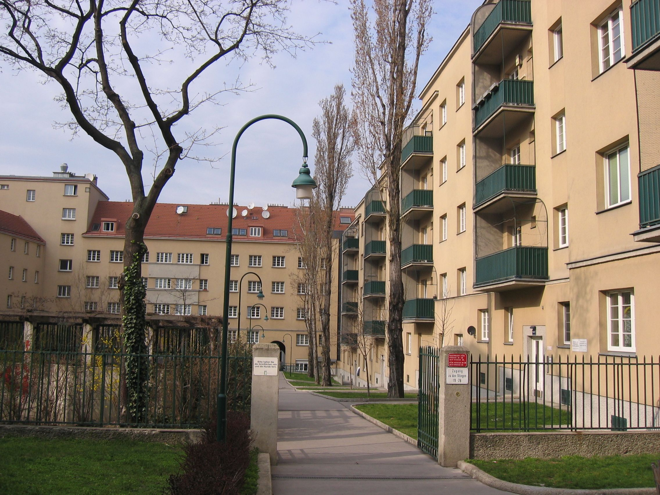 Innenhof des Matteottihofes